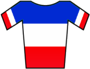 Maillot de Francia